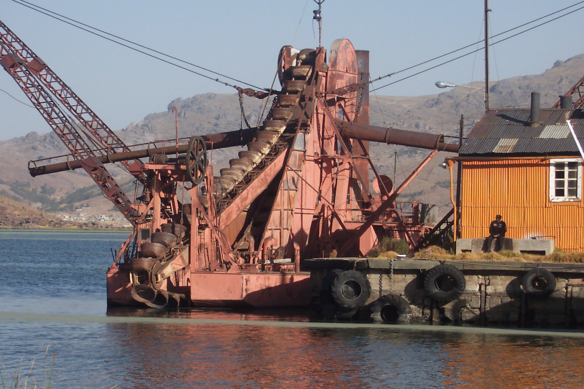 Eimerkettenbagger im Titicaca-See